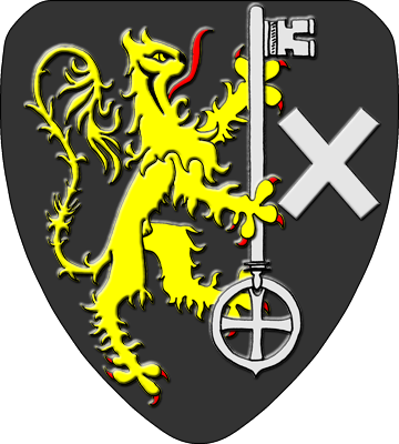 Armoiries de la commune de Incourt, blasonné de sable au lion contourné d'or, armé et lampassé de gueules tenant entre ses pattes une clef d'argent posée en pal, le panneton en haut également contourné et accostée à sénestre d'un flanchis du mesme